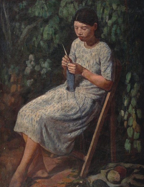 李梅樹作品：《編物》，1935年，油畫。第九回台展得獎作品，是李梅樹人物畫中第一張獲得獎勵的。